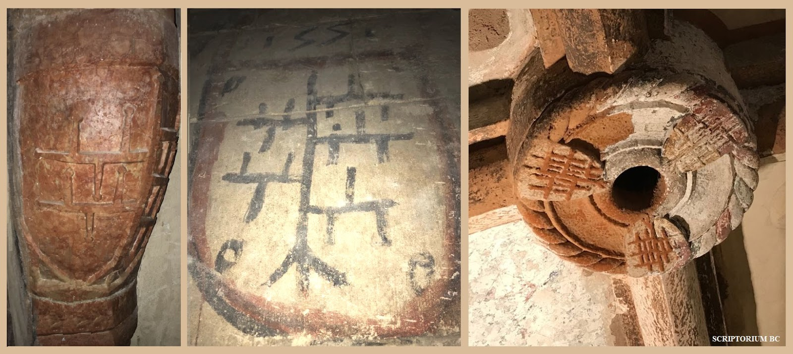 Volta della cuba della Cattedrale di Verona